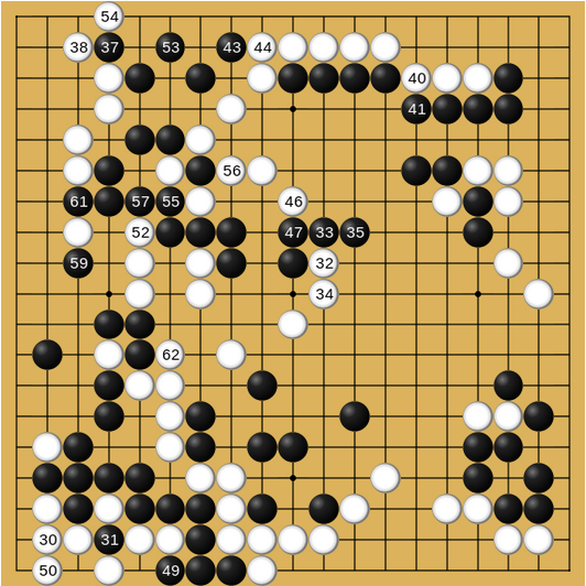 Au jeu de go, Iwamoto Kaoru vs Go Seigen - décembre 1952 - coups 130 à 162